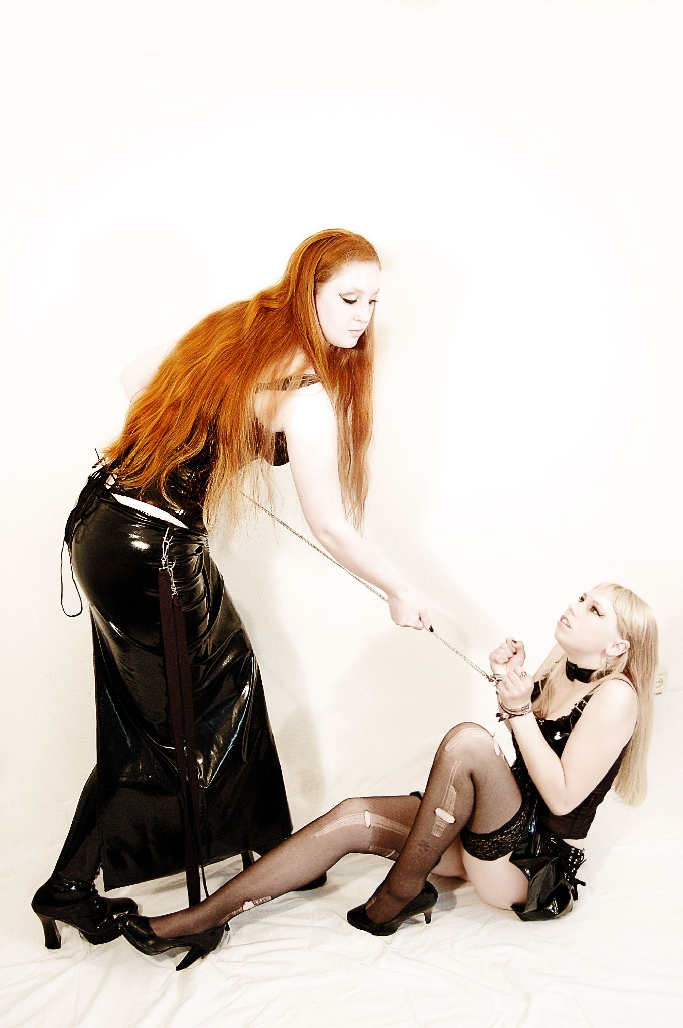 Pulling